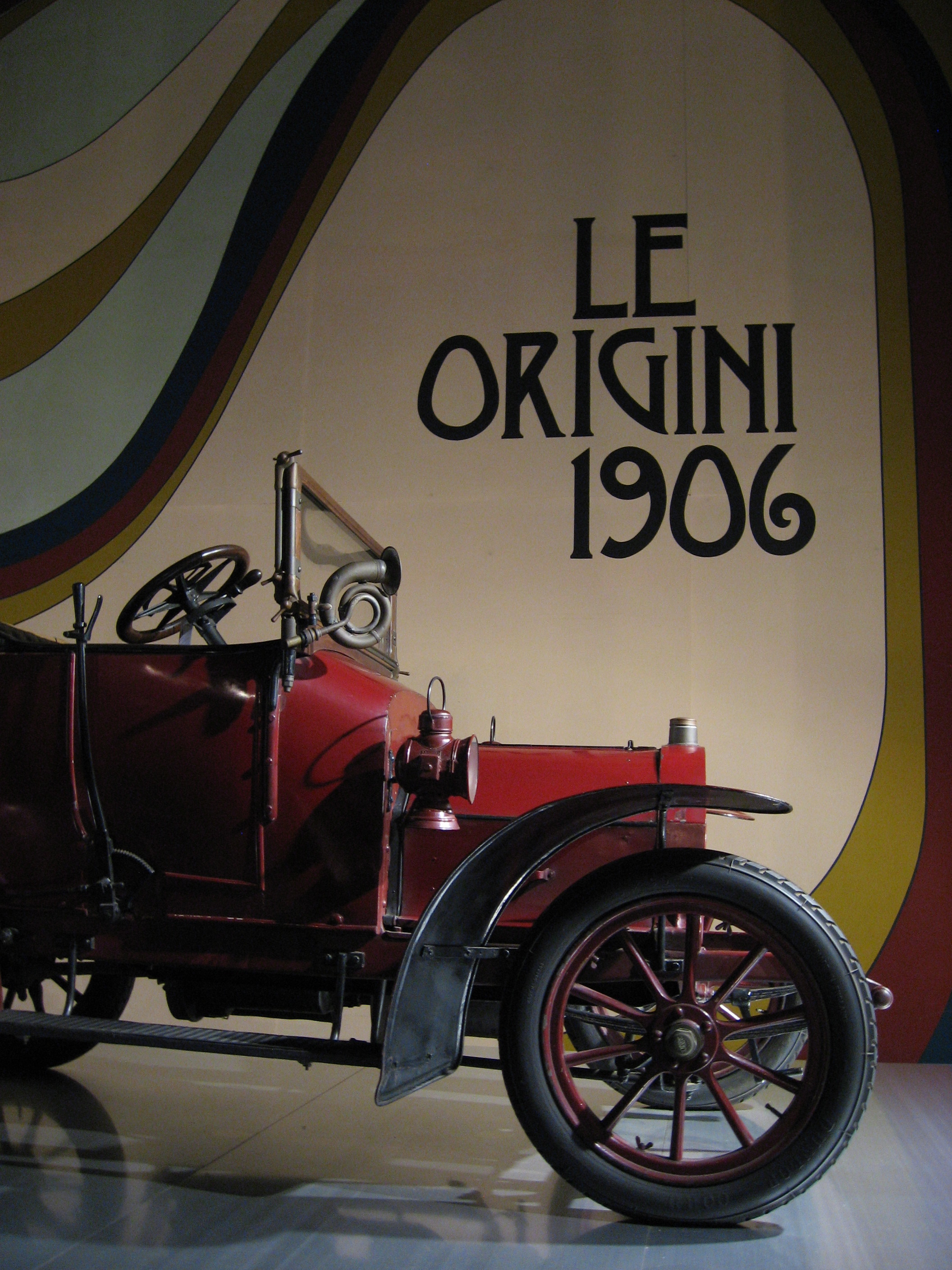 ALFA 15/20 HP